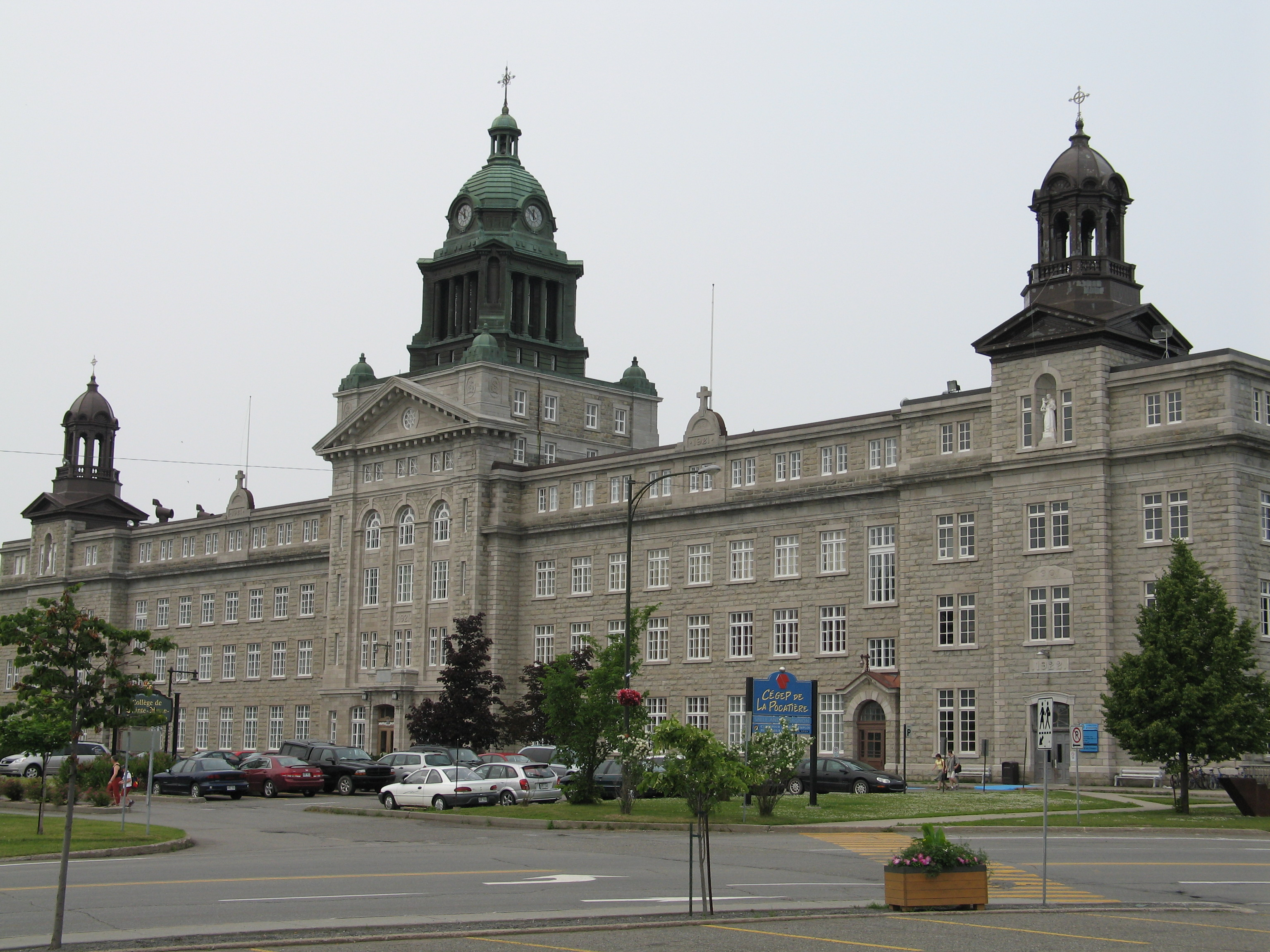 La facade partagée du Collège de Ste-Anne et du Cégep de La Pocatière, au Québec.